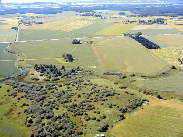 Steinssletta sett mot Røyse